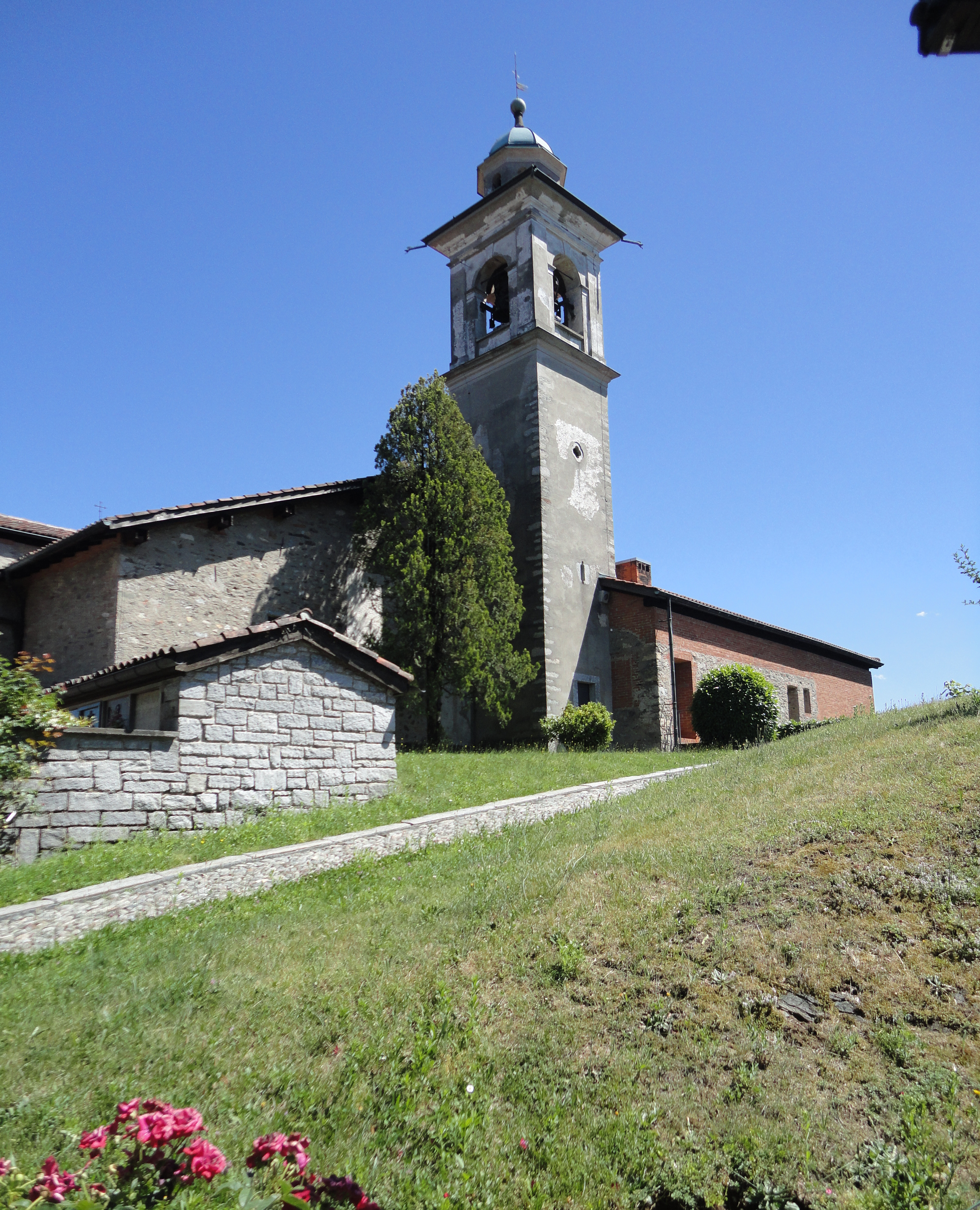 Chiesa parrocchiale di Santa Maria Assunta